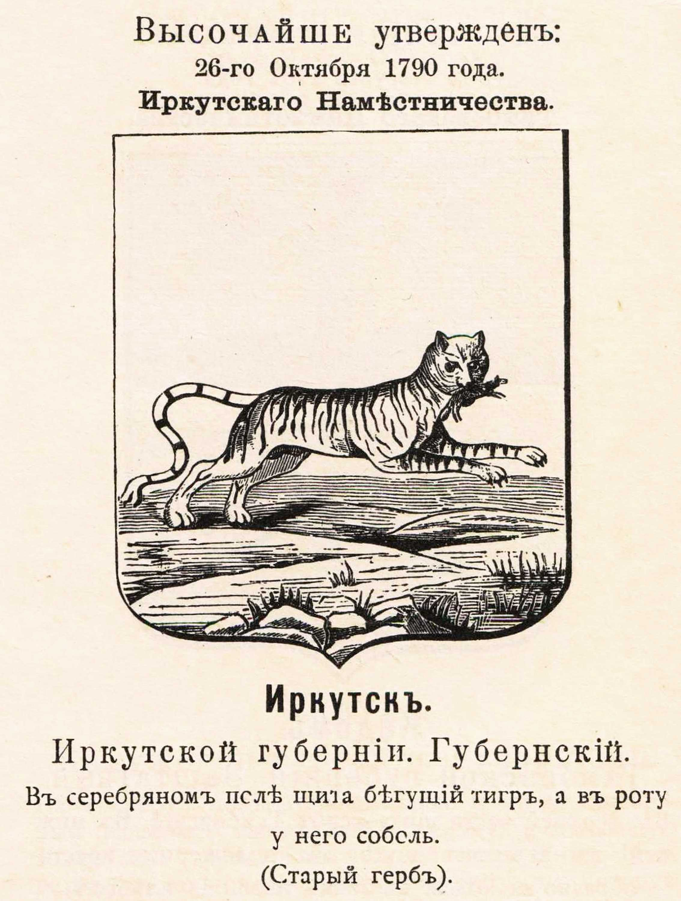 Official Russian Empire coat of arms Irkutsk. Герб Российской Империи губернского города Иркутск с официальным описанием в Гербовнике Винклера.